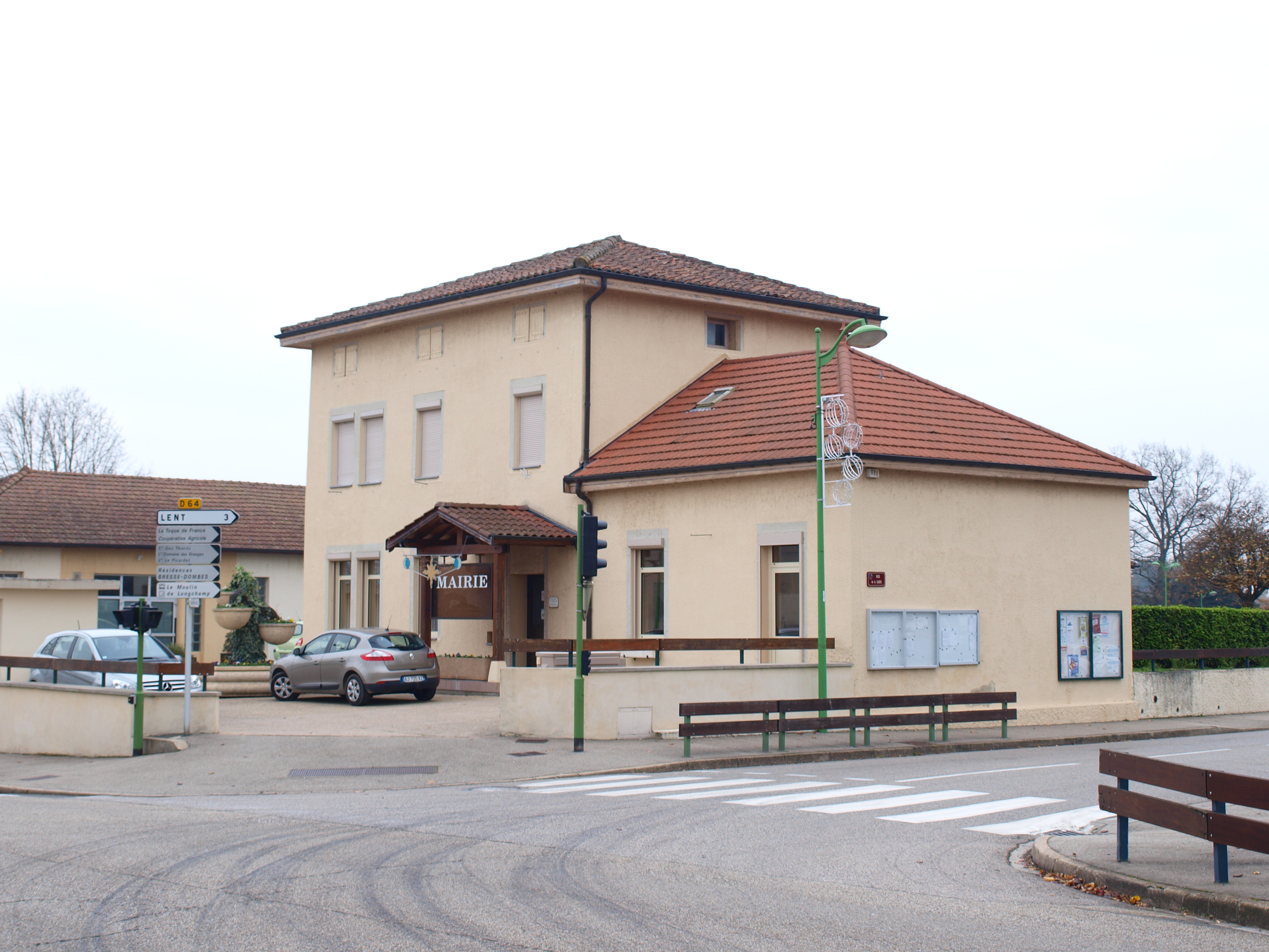 Servas (Ain, France) ; mairie